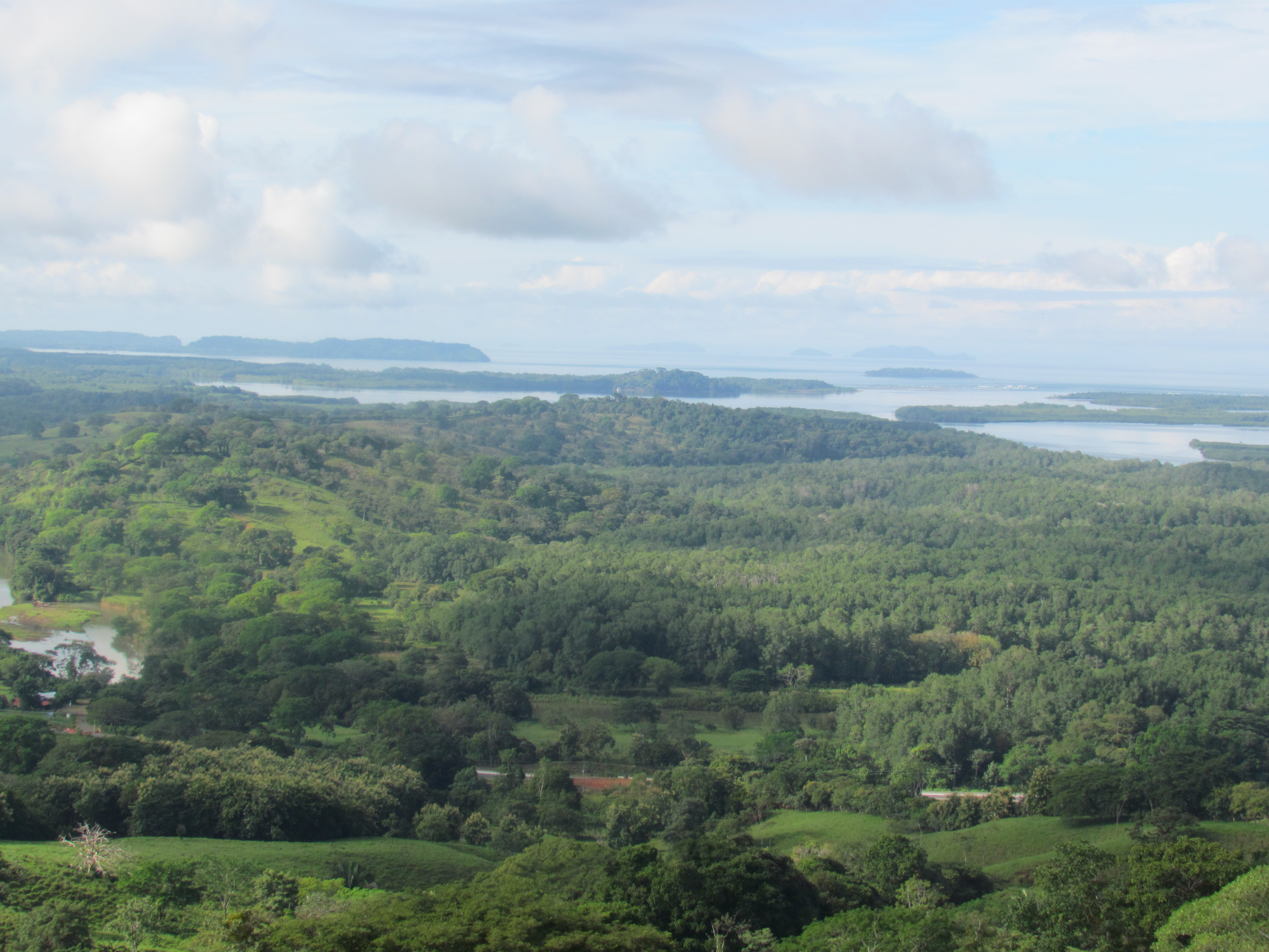 Es una vista panorámica de los manglares de Remedios a la derecha y Tolé a la izquierda de la imagen.